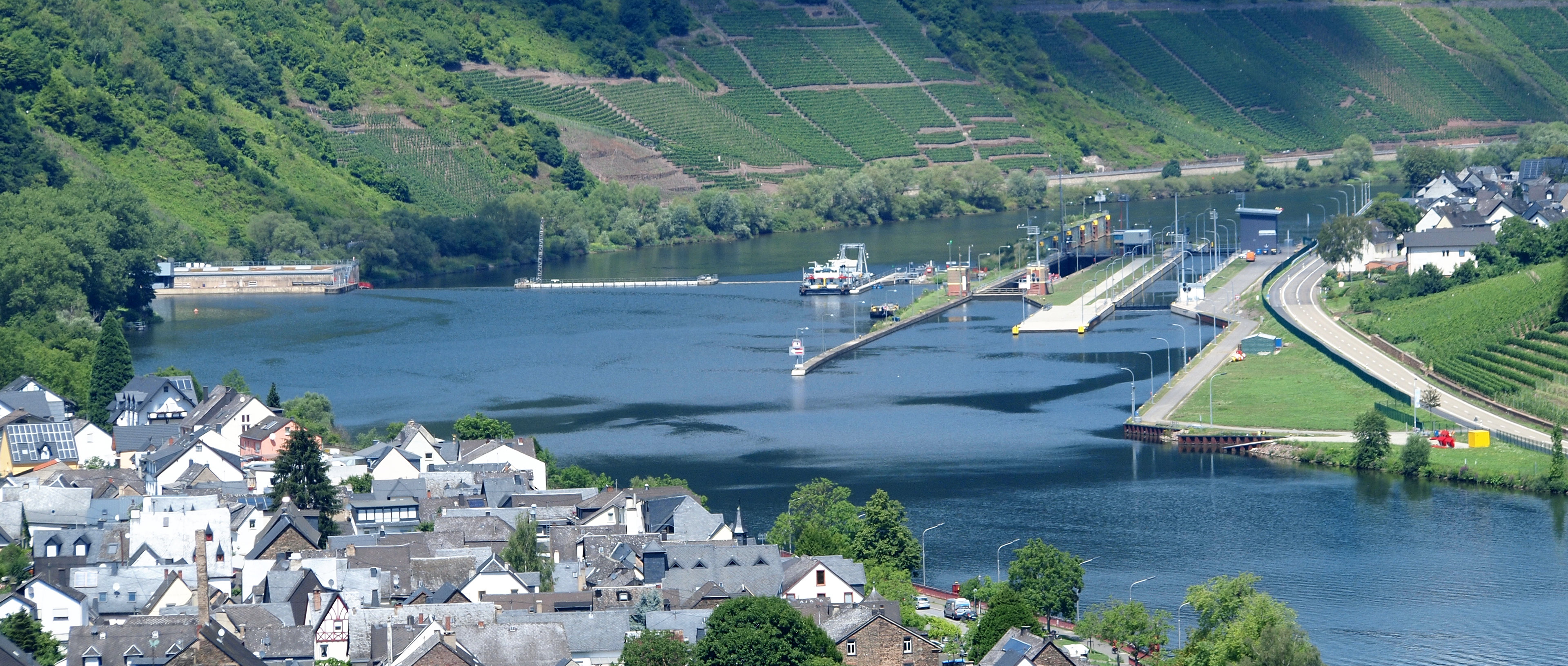 Staustufe Fankel an der Mosel (gesehen von Burg Metternich)